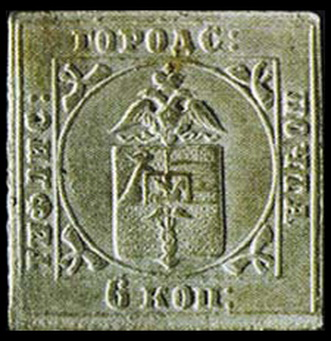 Tiflis stamp, 1857, 6 kopecks.